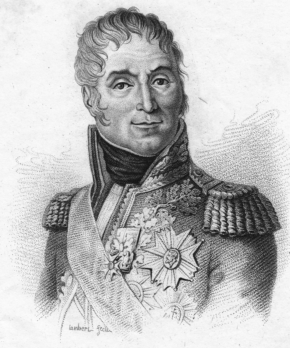 Le maréchal André Masséna, duc de Rivoli et prince d'Essling (1758-1817).